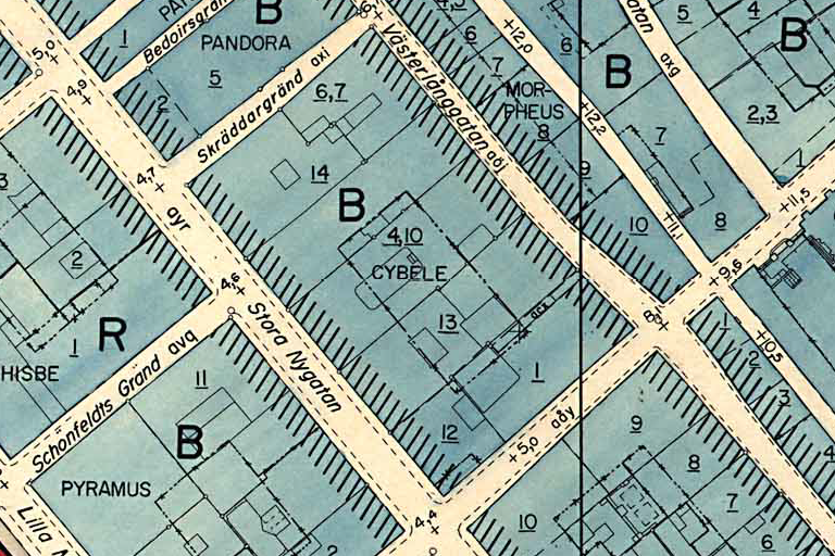 Del av Stadsplan över Gamla stan, visande kvarteret Cybele